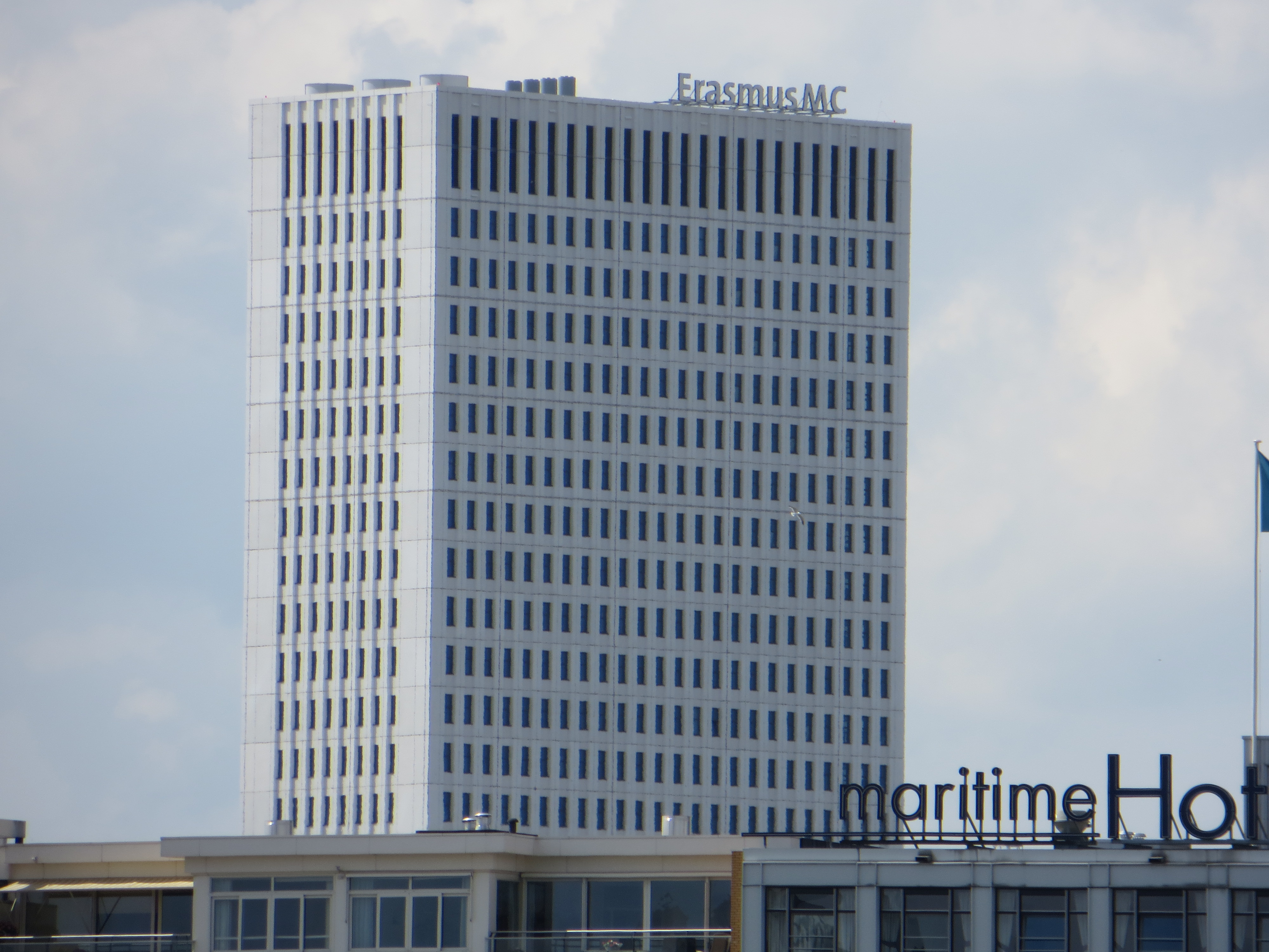 De nieuwbouw van het erasmus MC in Rotterdam.